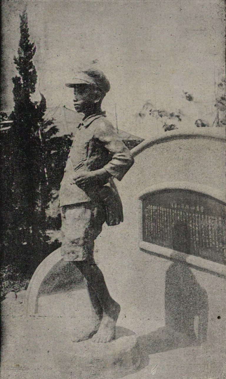 君が代少年（詹德坤）の銅像